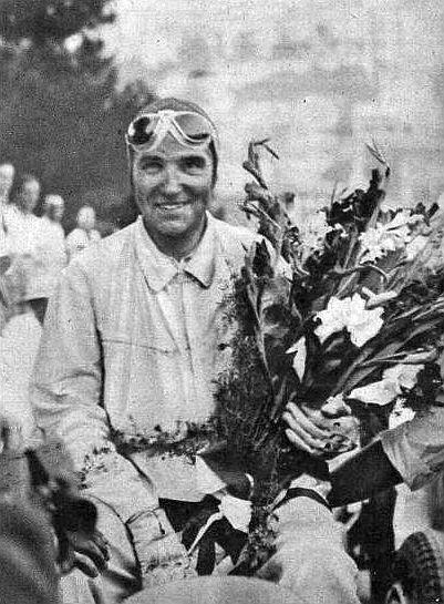 Manfred von Brauchitsch, vainqueur du Grand Prix de Monaco 1937 - 2.